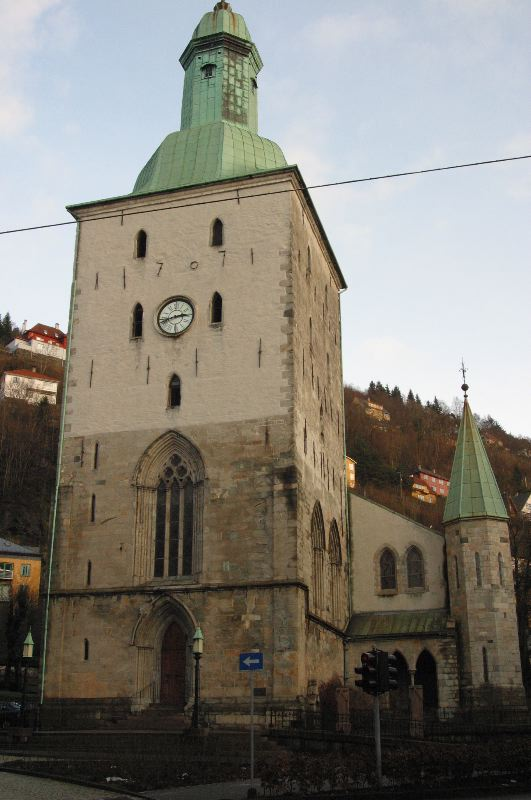 Bergen Domkirke, Bergen, Bergen kommune, Hordaland fylke, Norway.